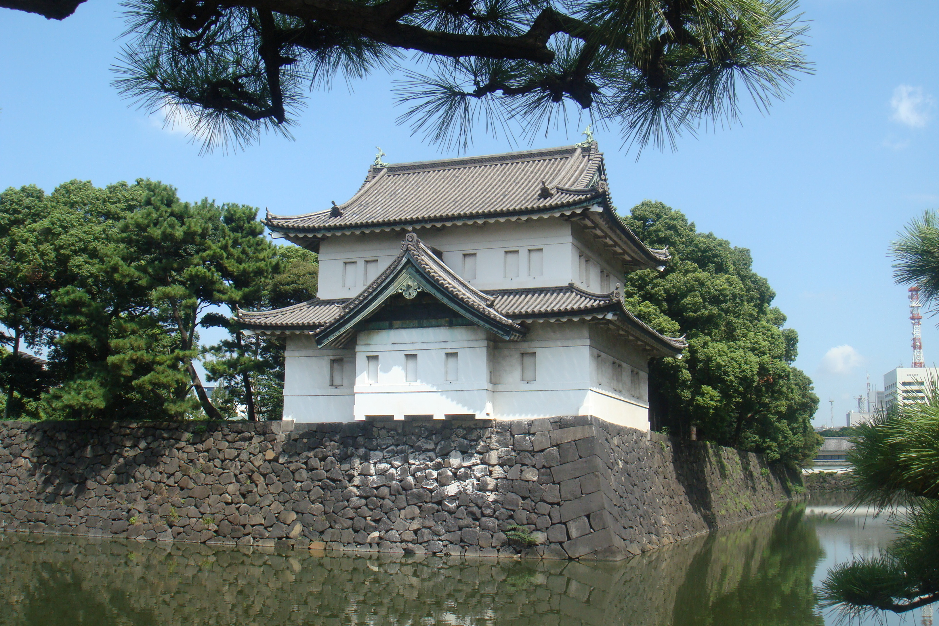 Империјална Палата Токио